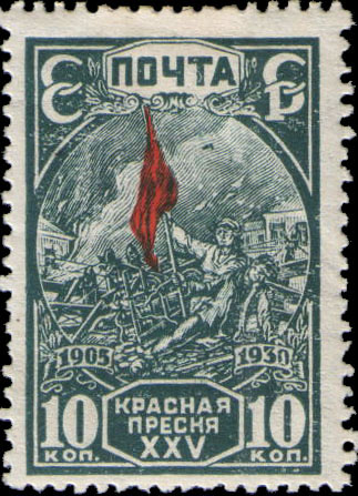 Почтовая марка СССР К 25-ти летию революции 1905 года.